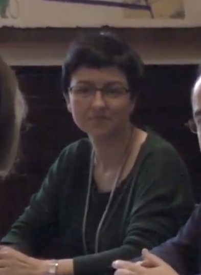 La UGT de Catalunya ha presentat aquest matí al PSC, en el Parlament de Catalunya, la proposta: 'Garantia +55' i que consisteix en rescatar a les persones aturades majors de 55 anys.